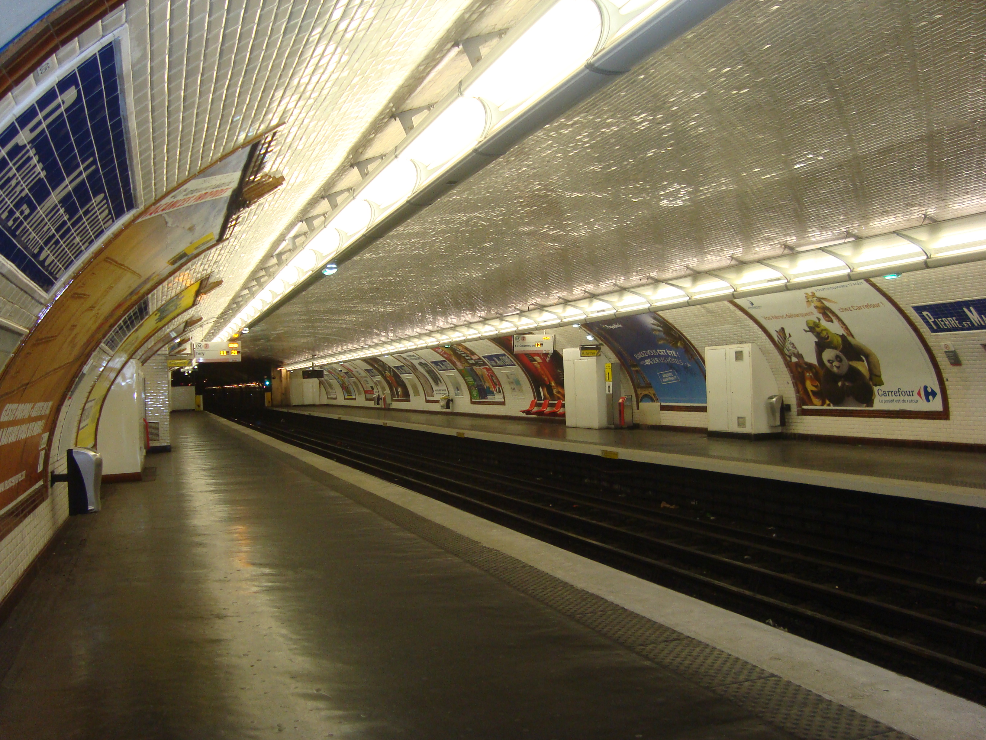 Quais de la station Pierre et Marie Curie sur la ligne 7 du métro de Paris